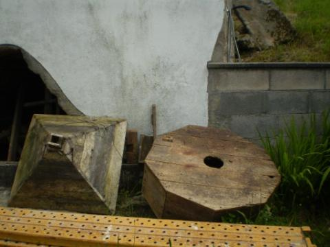 O Muíño de Muiñeiro en Xove.